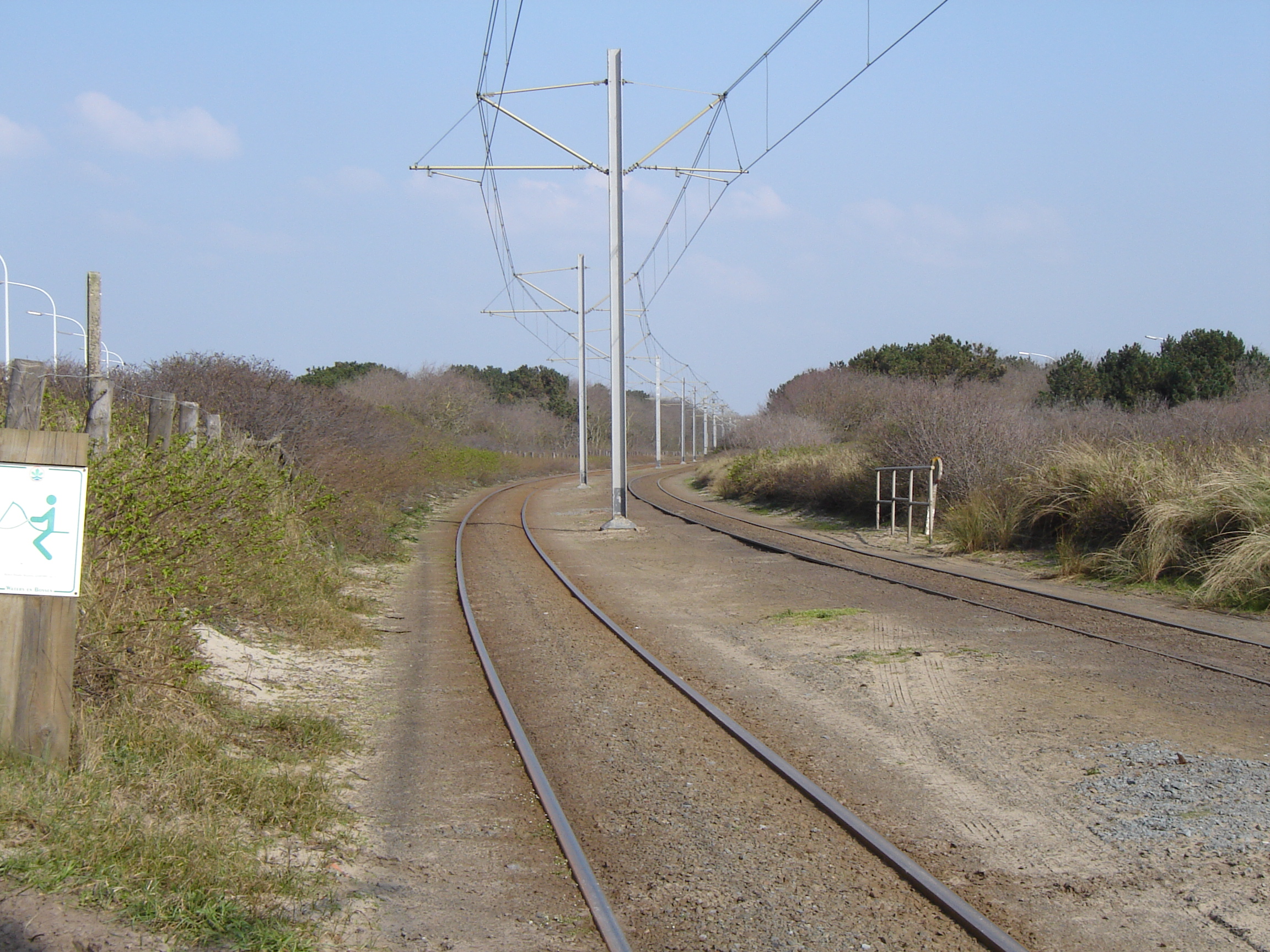 Sporen van de kusttram, tussen De Haan en Wenduine, grondgebied Vlissegem. Tram rail tracks of the coastal tram, between De Haan and Wenduine (territory of Vlissegem). In De Haan, West Flanders, Belgium